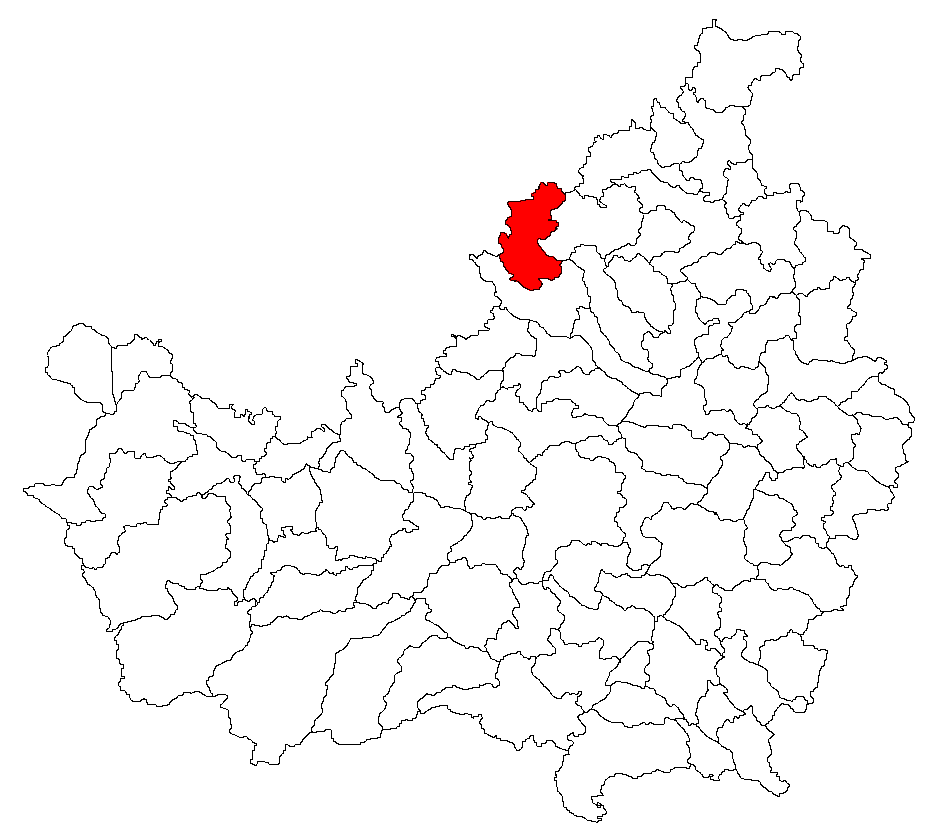 Categorie:Hărţi ale judeţului Cluj